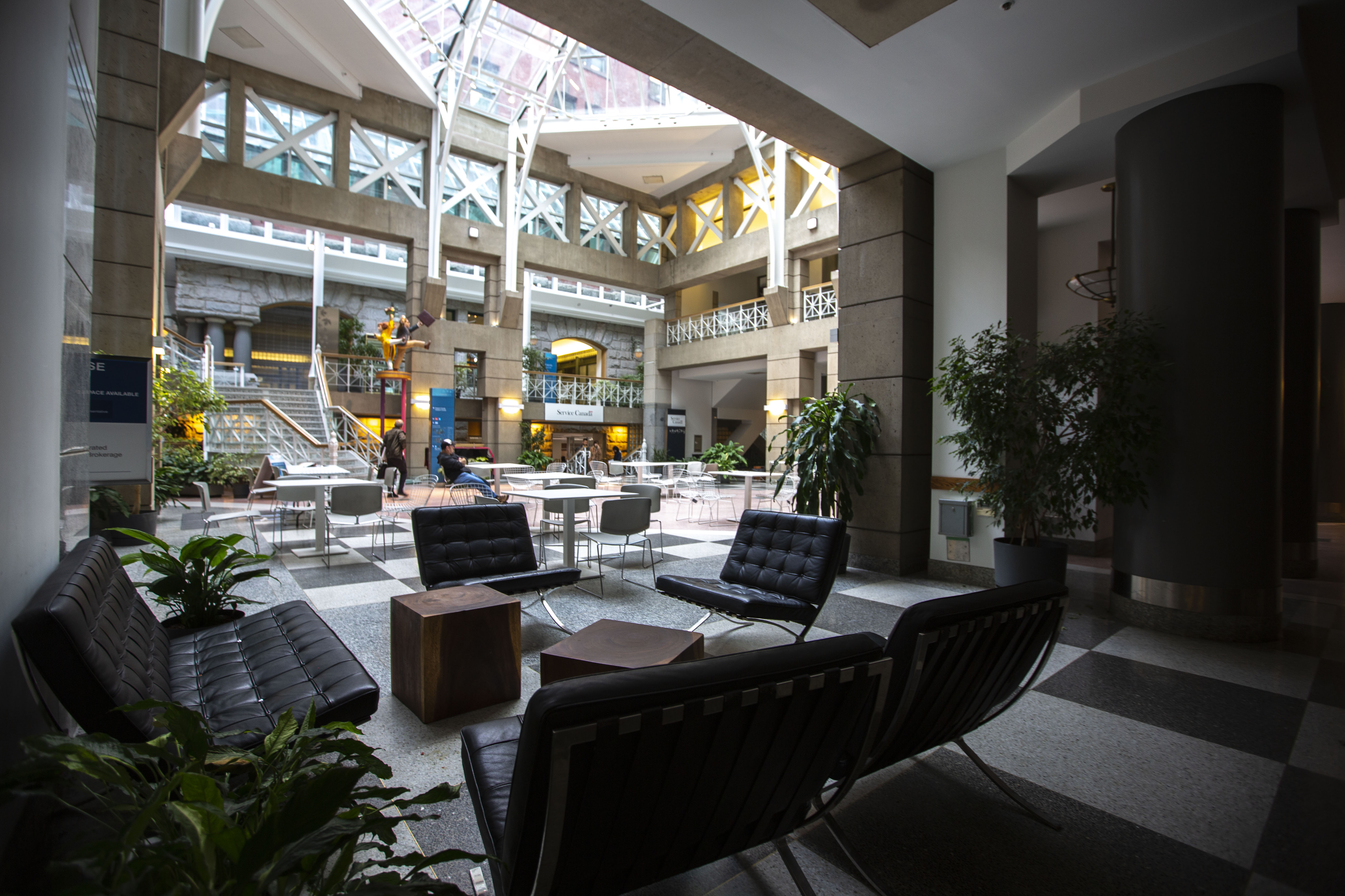 Sinclair Centre